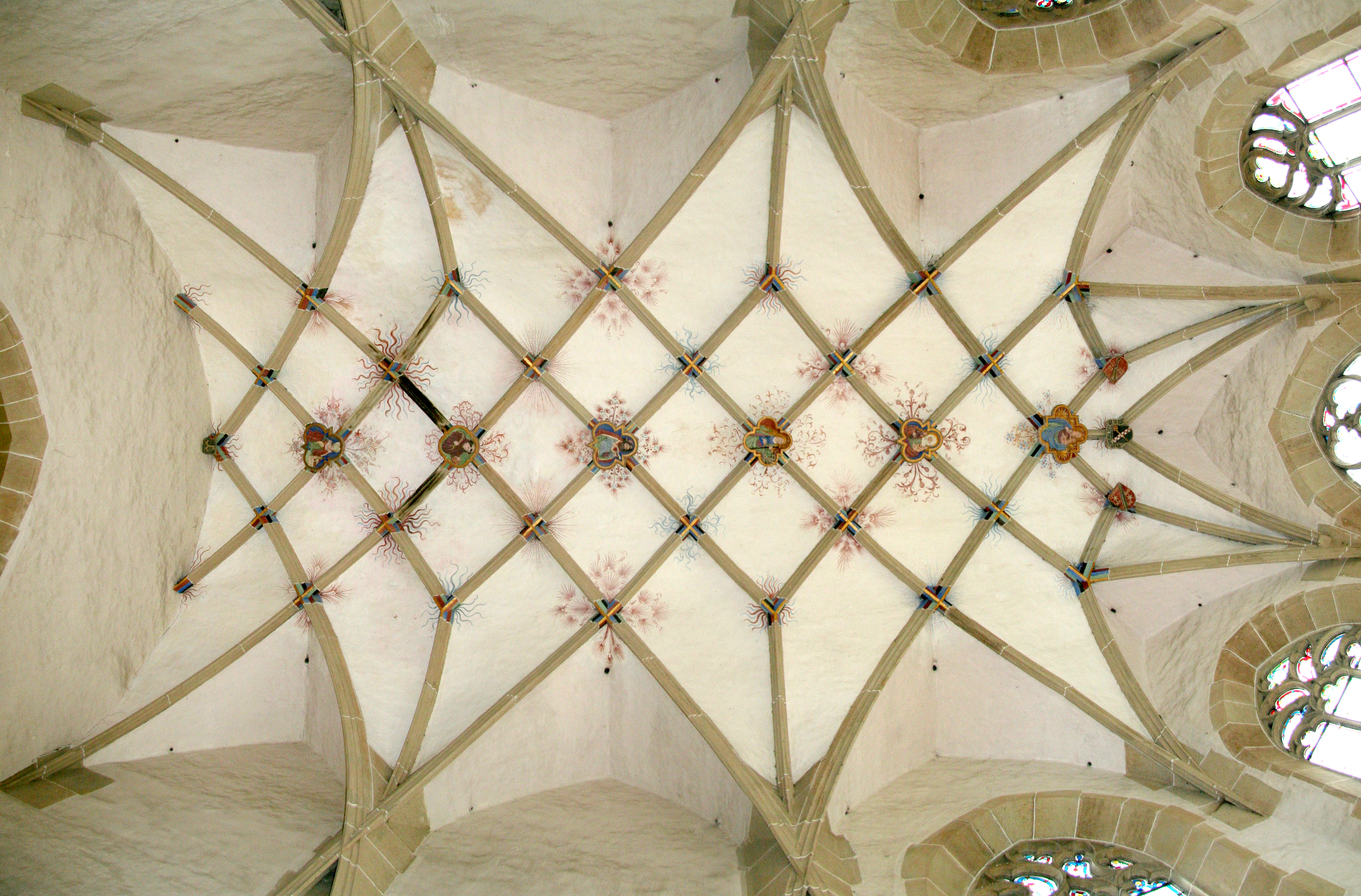 Maschennetzgewölbe im Chor der Liebfrauenkirche in Lienzingen (Mühlacker)